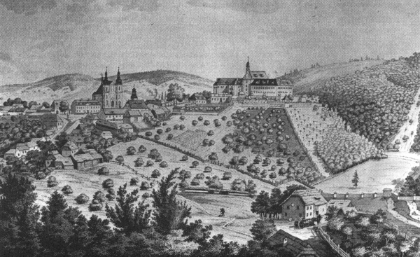 Lomnice